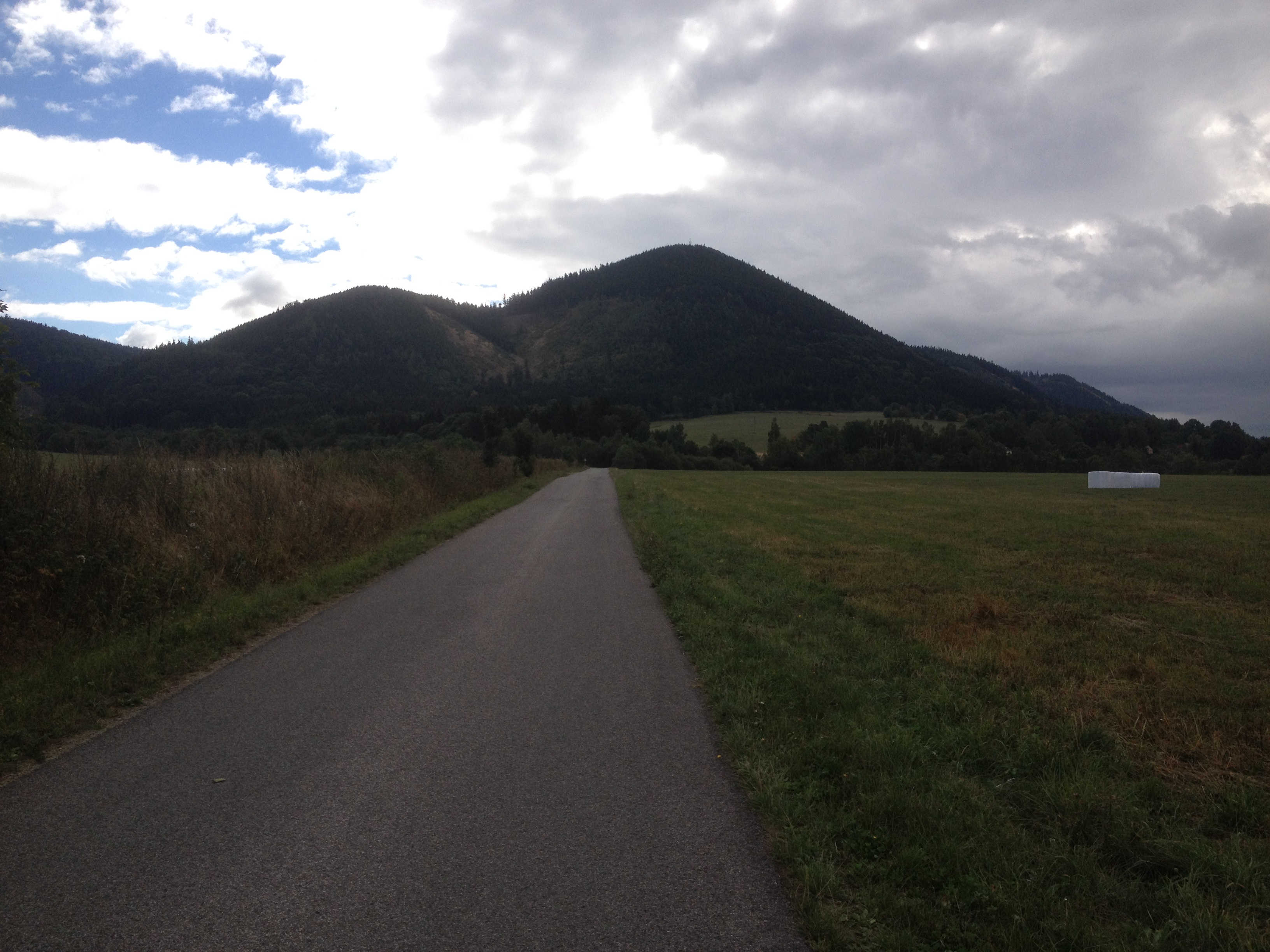 Góra Kralowiecki Szpicak.